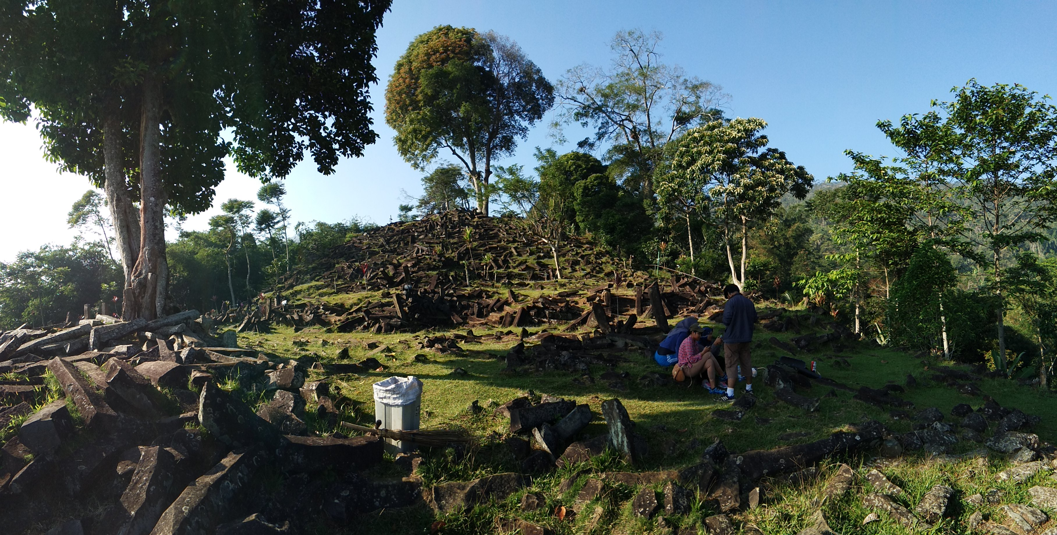 Satu lagi situs arkeologi yang sering dihubungkan dengan mistis. Hanya karena kehadiran film bertema fiksional, bukan berarti itulah hal yang terjadi pada kenyataannya. Pada kenyataannya, Gunung Padang masih menjadi tanda tanya besar bagi para peneliti. Situs ini adalah salah satu situs yang megah yang dapat menunjukkan peradaban yang beragama pada masa lalu.